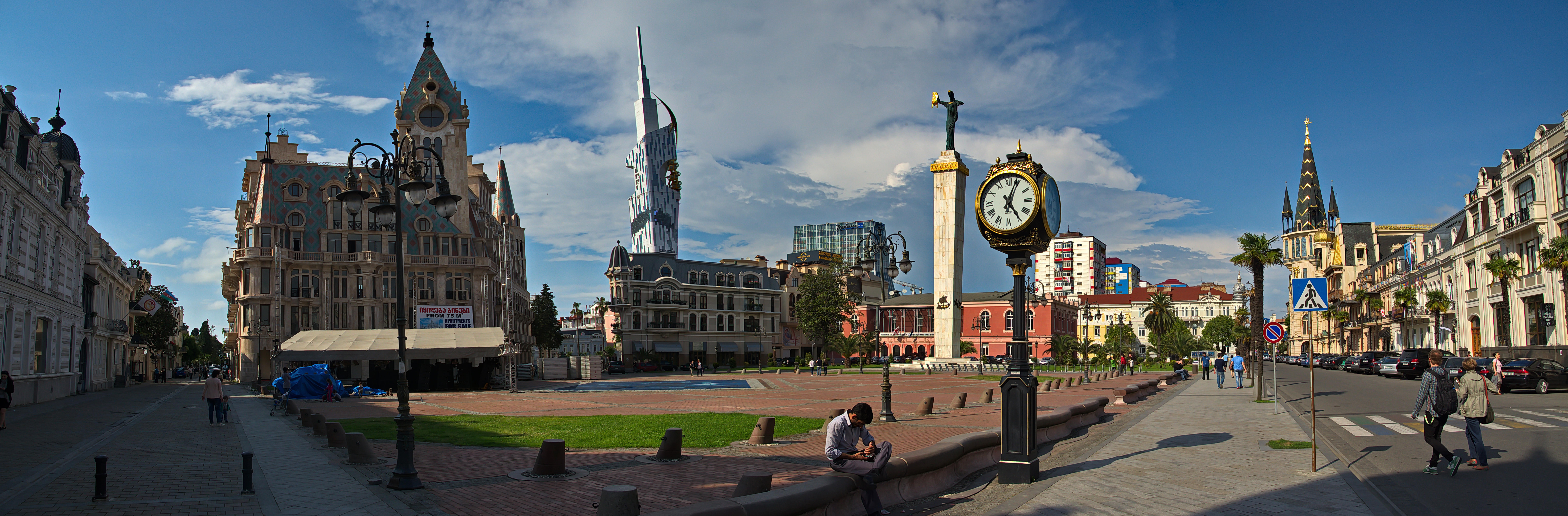 1071 - Kaukasus 2014 - Georgien - Batumi